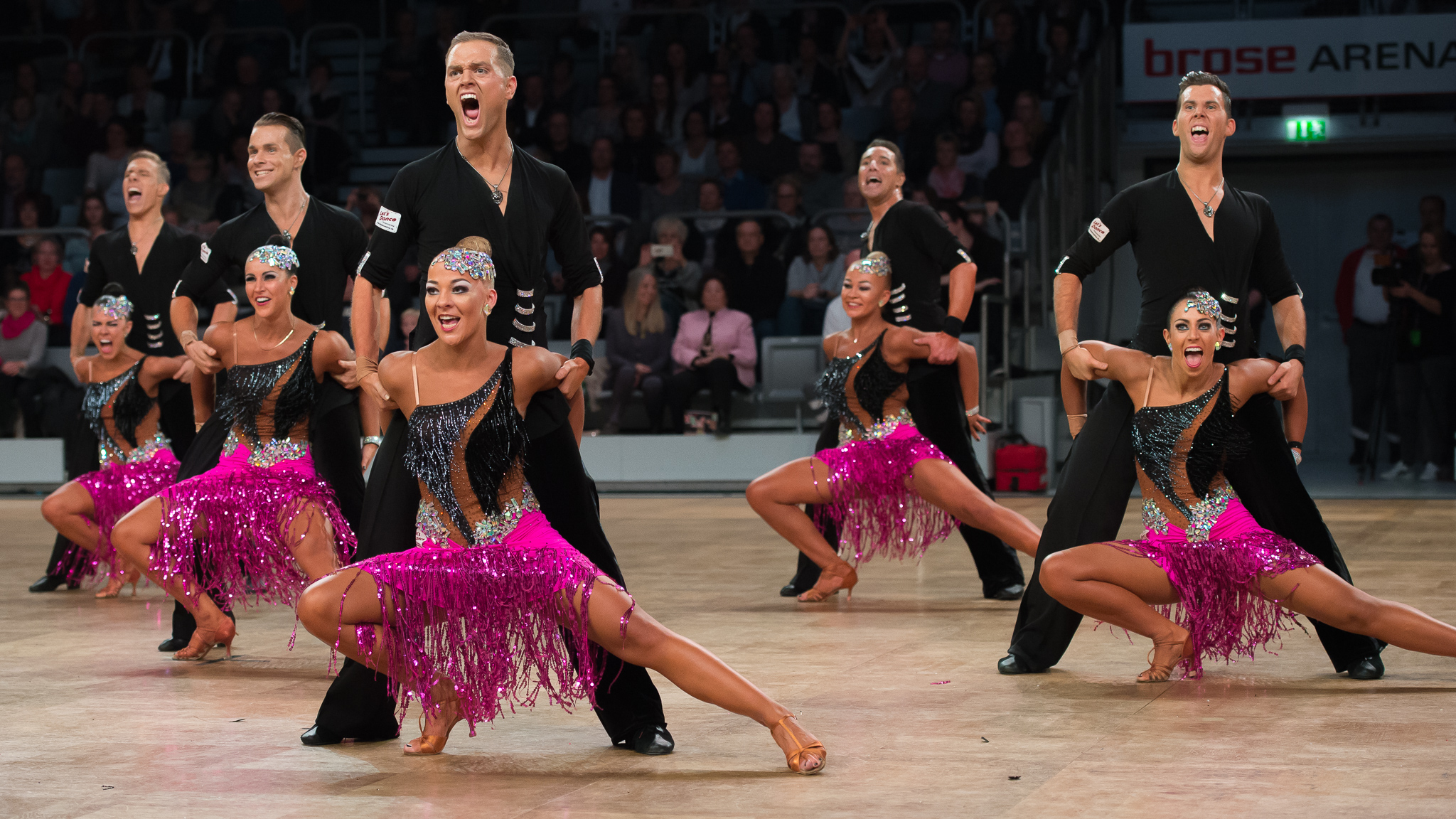 Brose Arena Bamberg,Deutsche Meisterschaften der Formationen Standard & Latein 2016,Grün-Gold-Club Bremen A,Noises,Tanzsport,Voices and Melodies